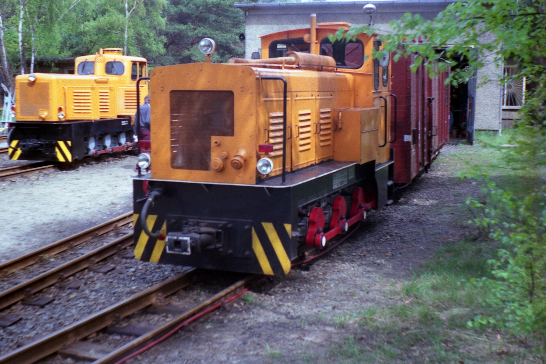 Diesellok 399 603 Typ Ns 4 bei der Berliner Parkeisenbahn